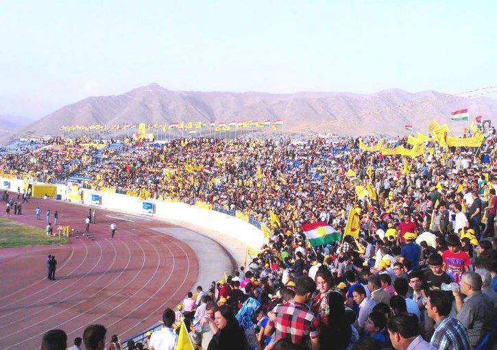 دهۆك پايته‌ختى زيندووكردنه‌وه‌ى بوونه‌ نه‌ته‌وه‌يه‌كان دهۆك د پيشه‌وازى يا بوونه‌يا شۆرشا 11 ئه‌يلۆلى ne ev demeye dîrûke ne keseke civake paytextê bûneyên neteweyî duhoke duhok di pêşewaazî ya bûneya 11 îlonê de